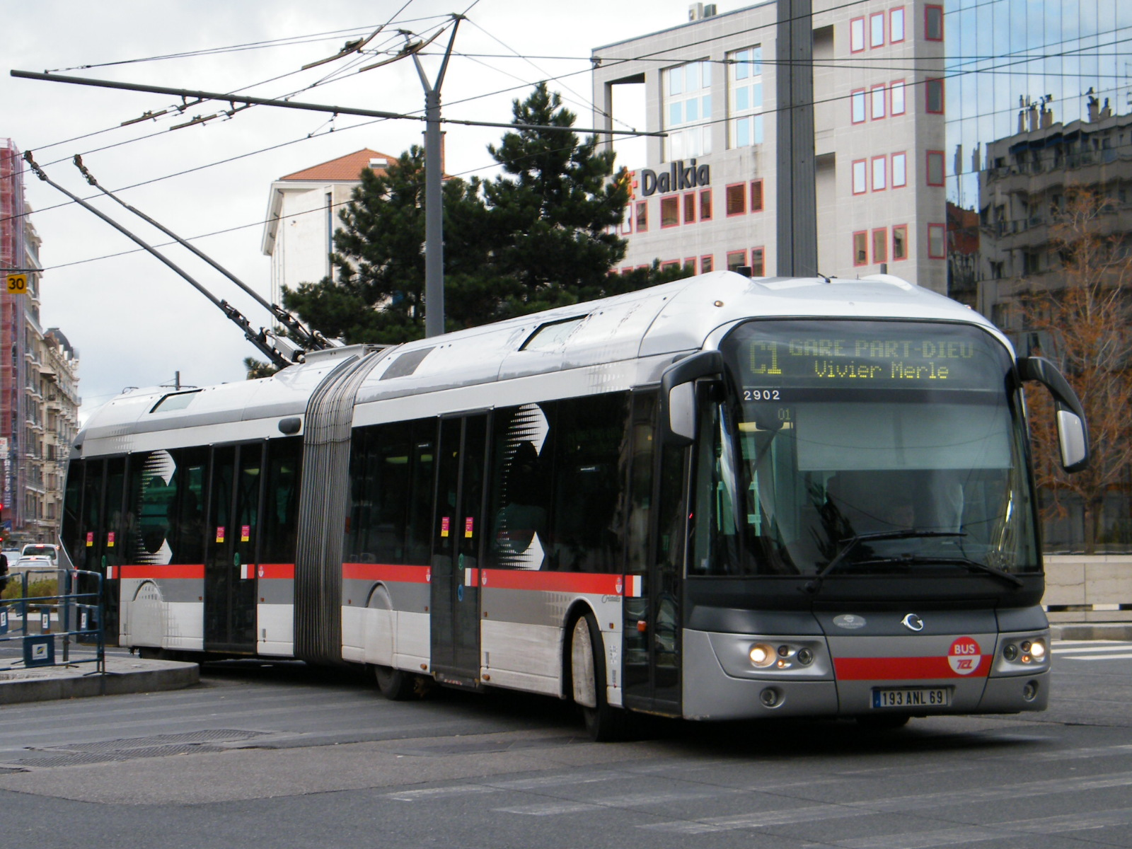 Un Irisbus Cristalis ETB18 de la Ligne C1 arrive à Part-Dieu Vivier Merle.